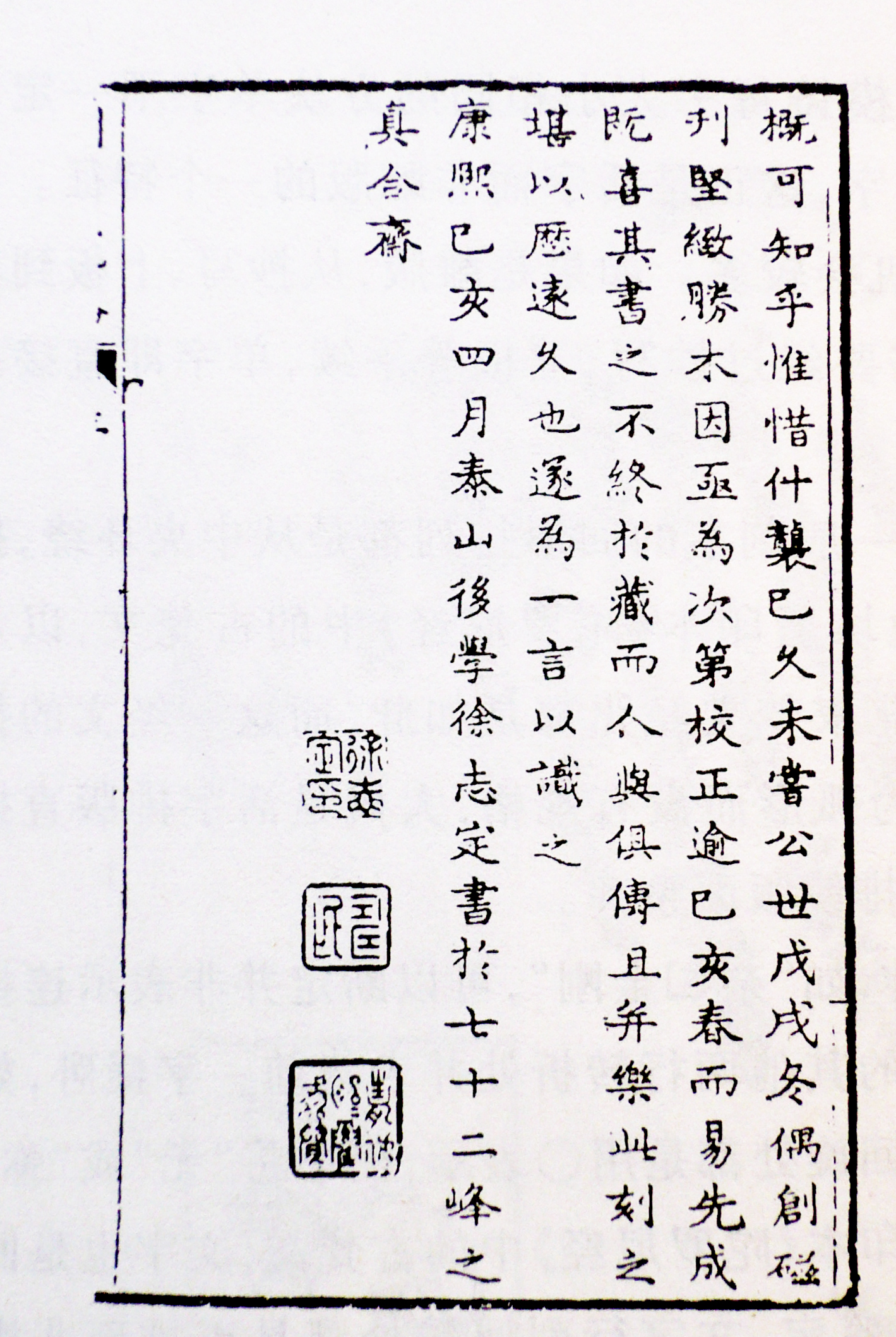 1719年瓷活字周易说略